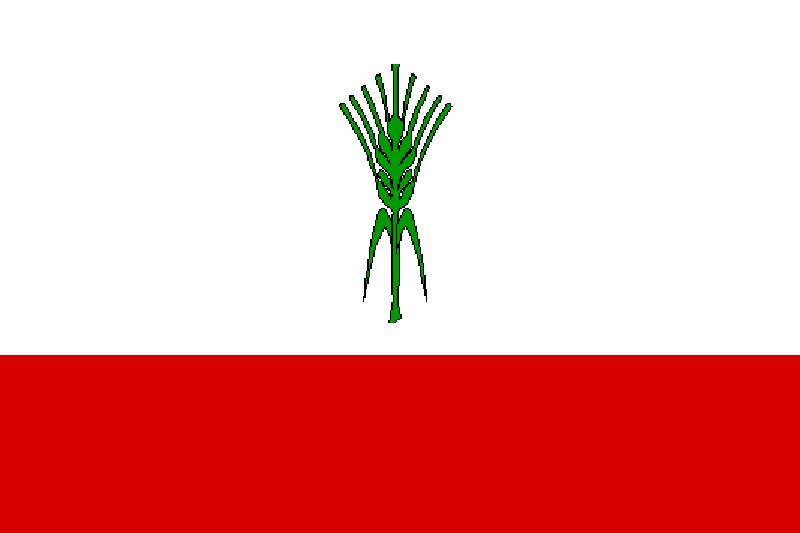 Bandera de Villasequilla